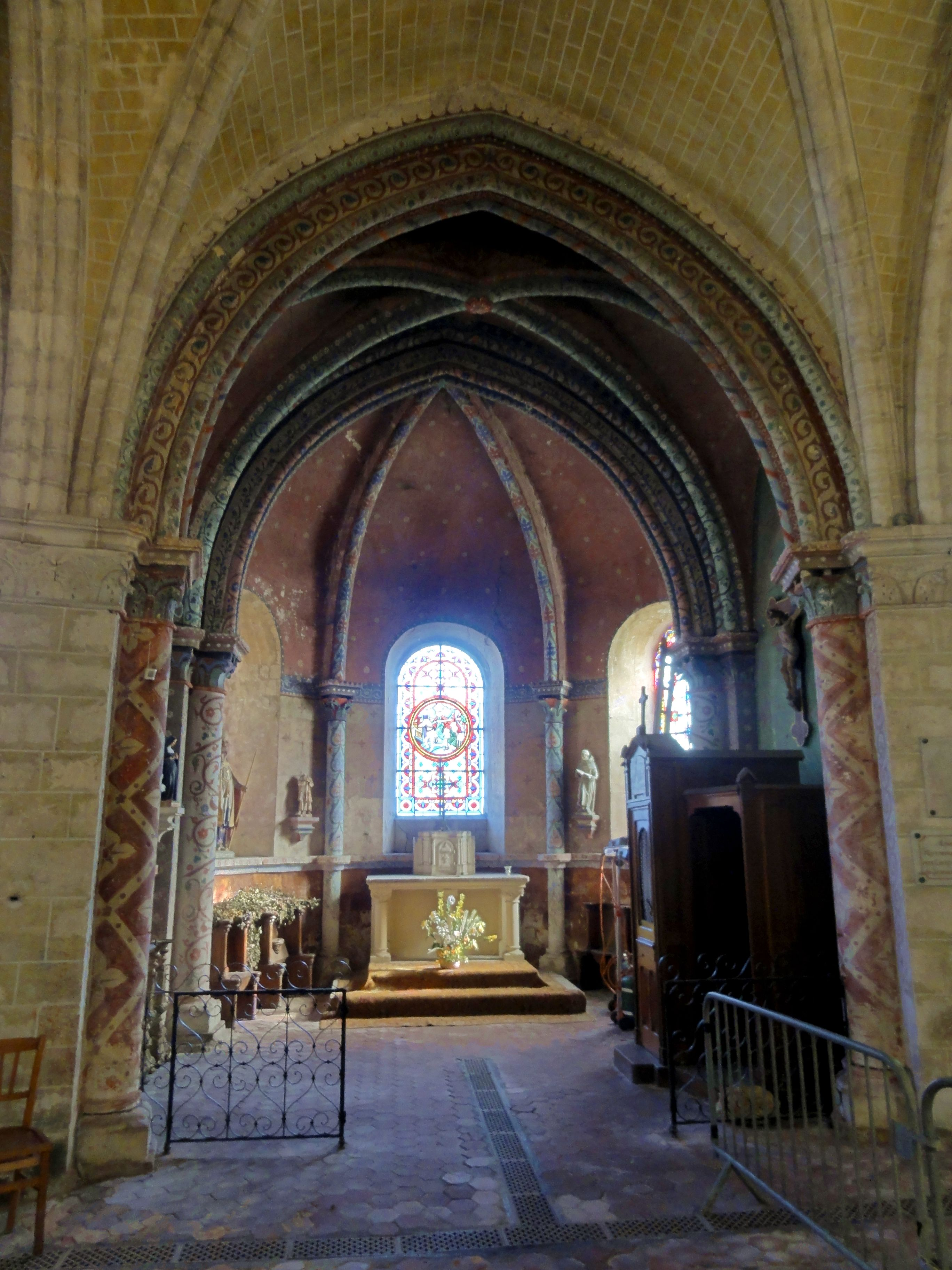 Déambulatoire, vue dans la chapelle sud-est.